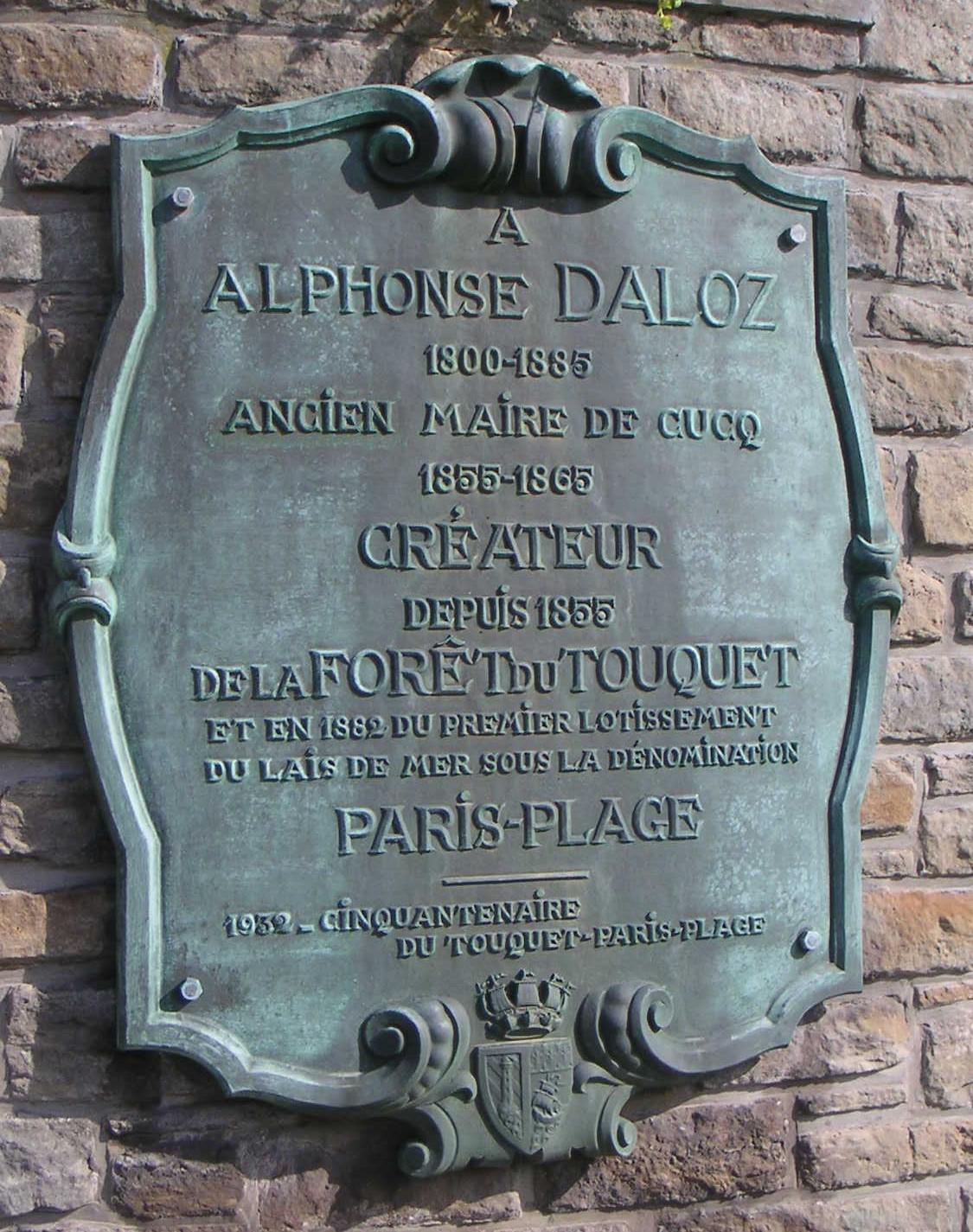 Photo prise par moi-même au Touquet le 8 juillet 2006